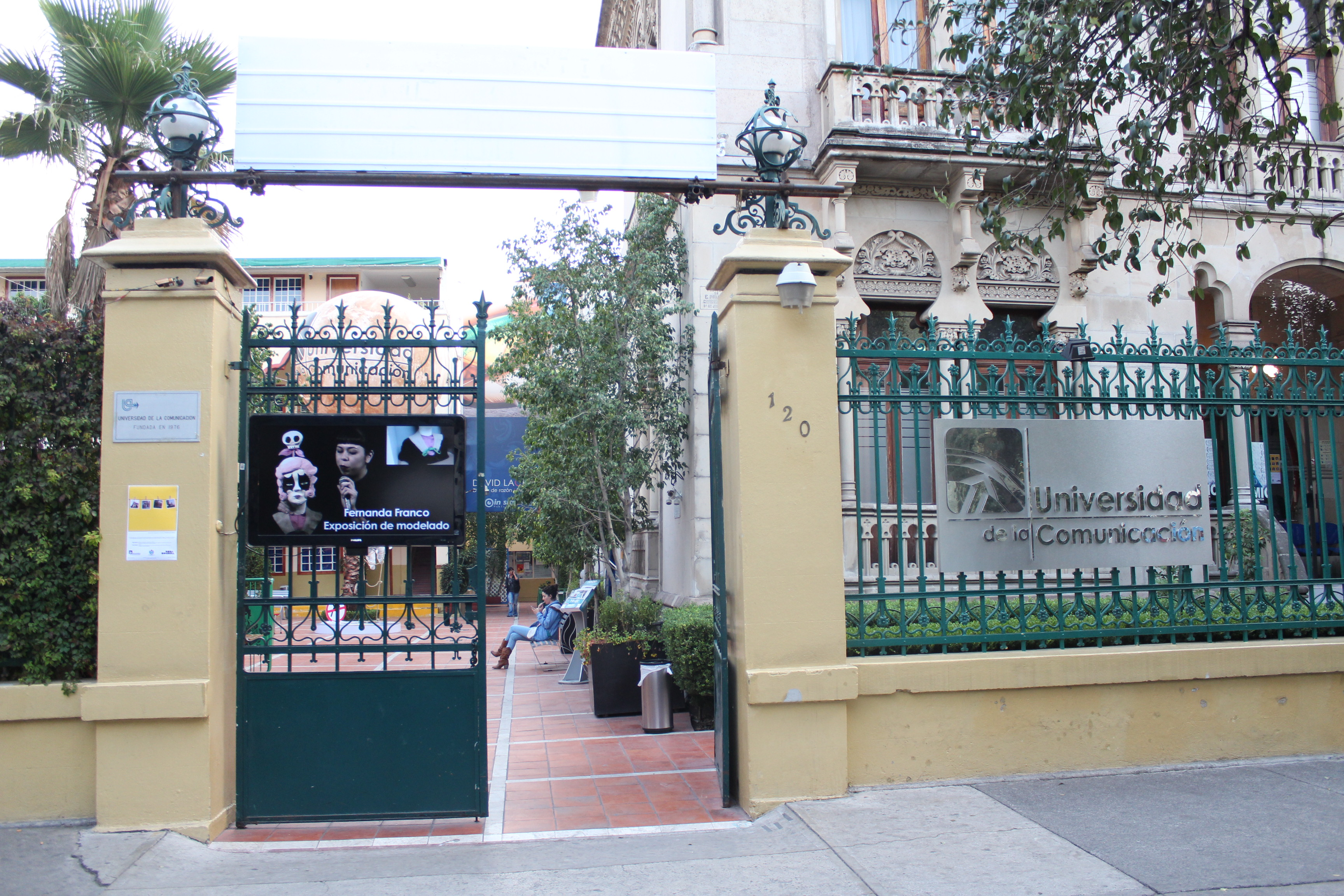 Fachada de la Universidad de la Comunicación, ubicada en la Colonia Roma, Zacatecas 120